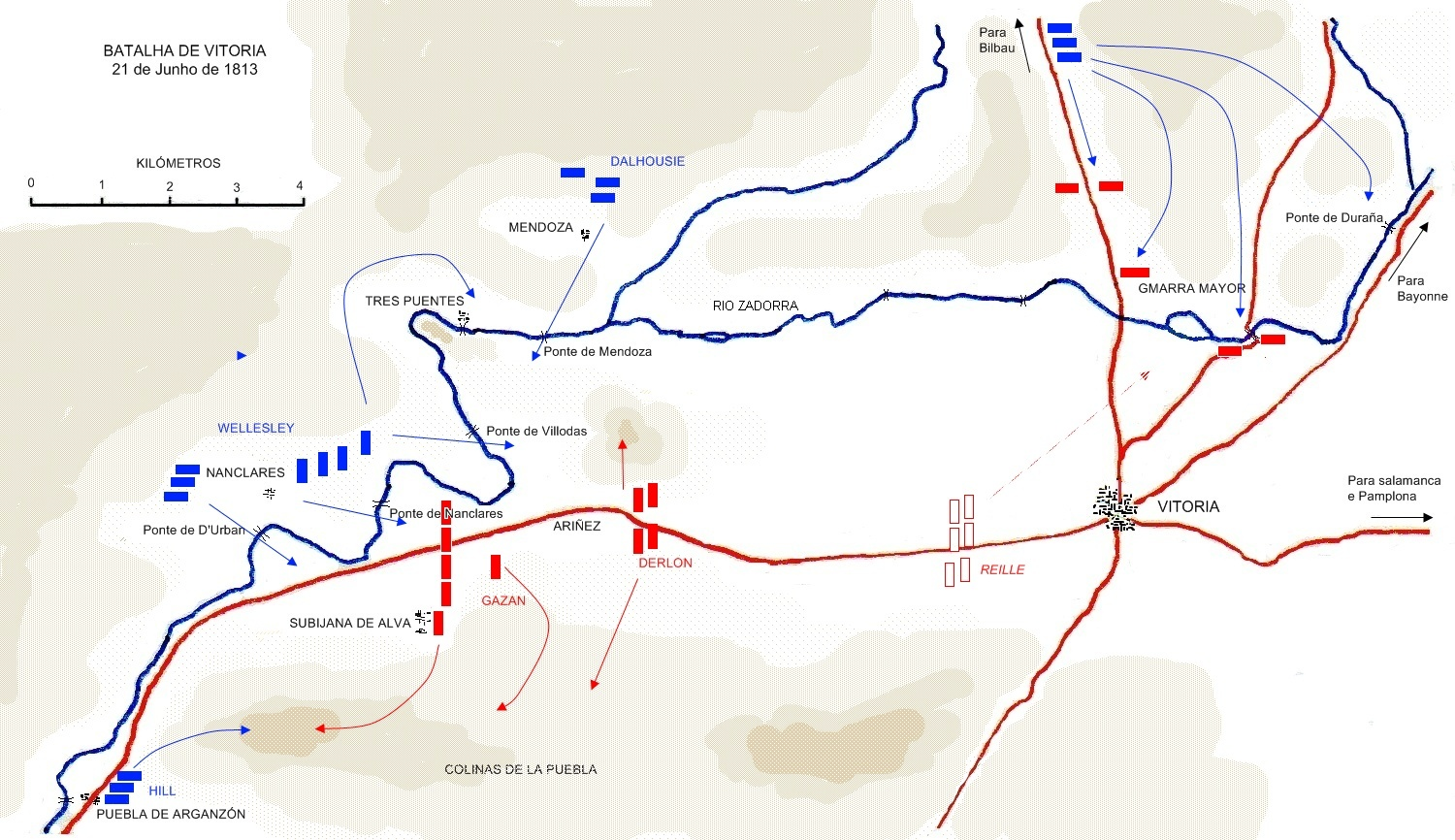 Mapa da Batalha de Vitoria, 21 de Junho de 1813